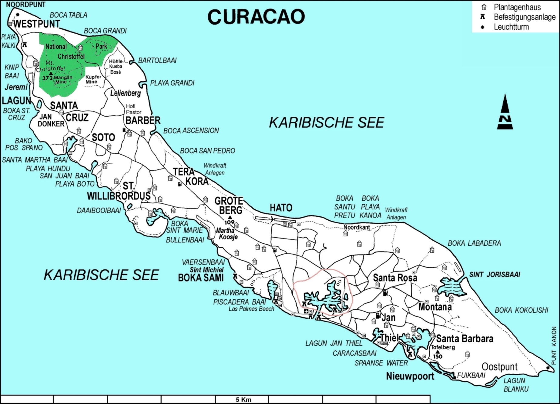 Karte von Curacao mit dem Christoffel-Nationalpark (oben links, grün)